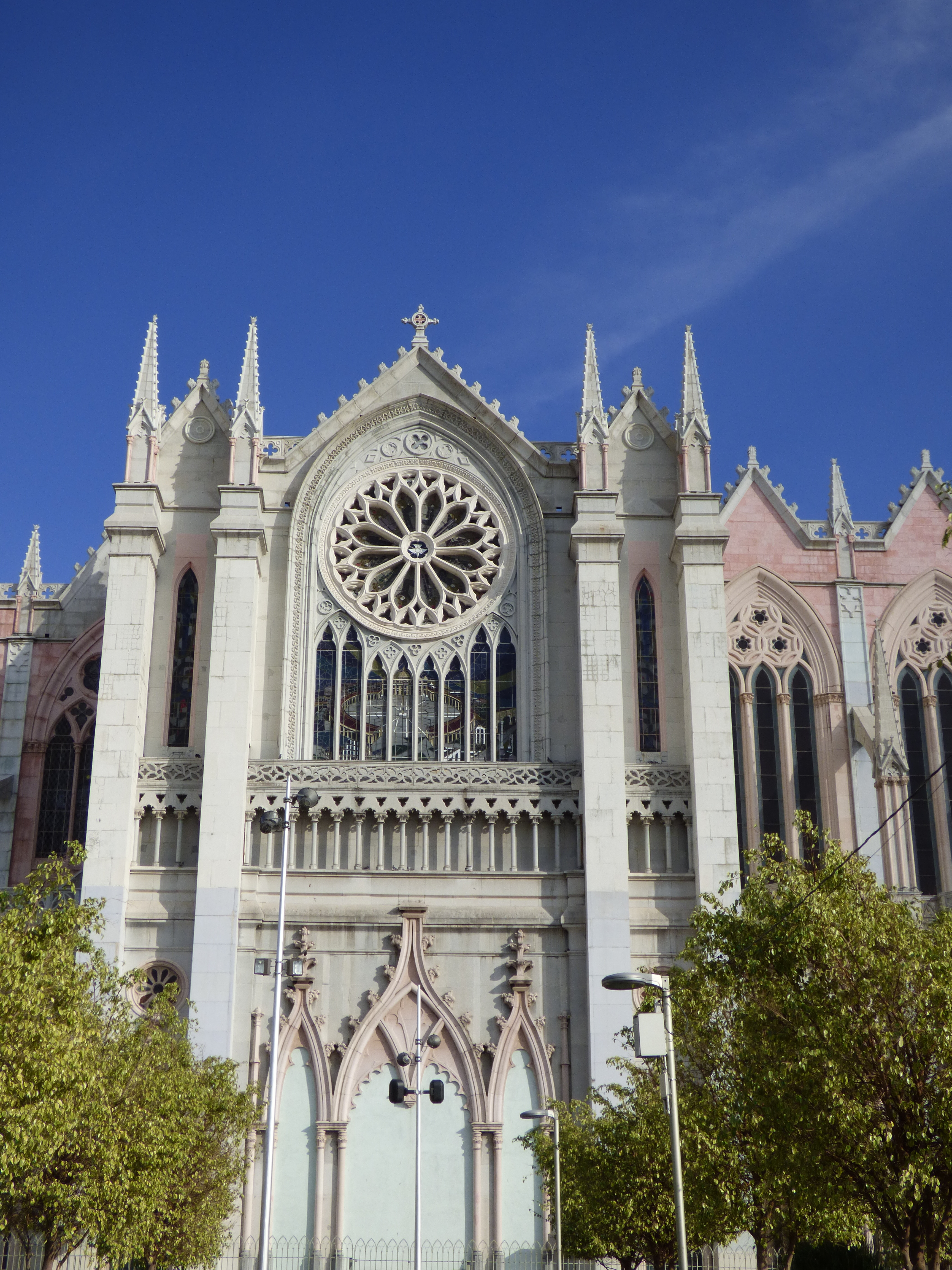 Detalle de la fachada lateral del Templo Expiatorio de León, Gto., México